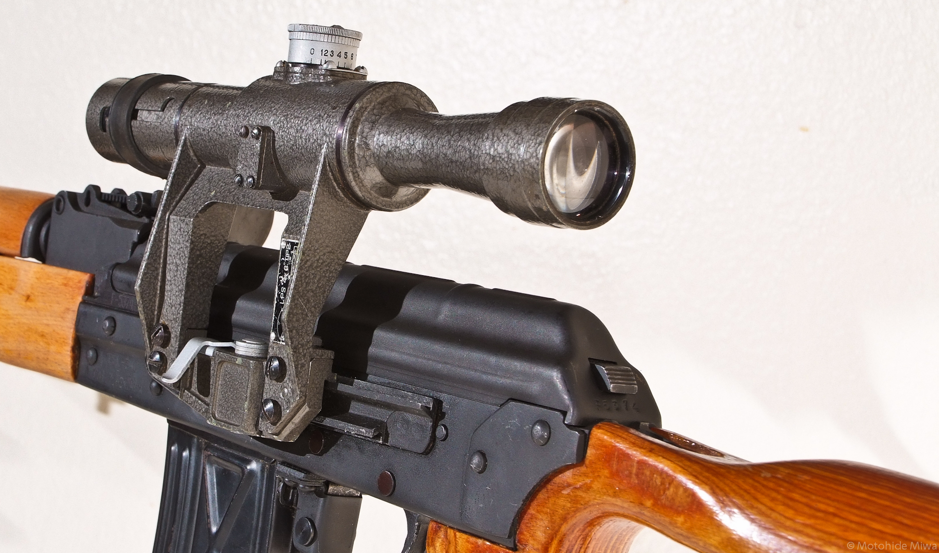 PSL Rifle